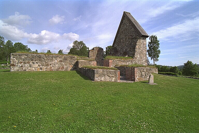 Runsten i bildens högra del.Selångers kyrkoruin 1999-06-30 med runstenen Selångersstenen (M 10) i bildens högra del.